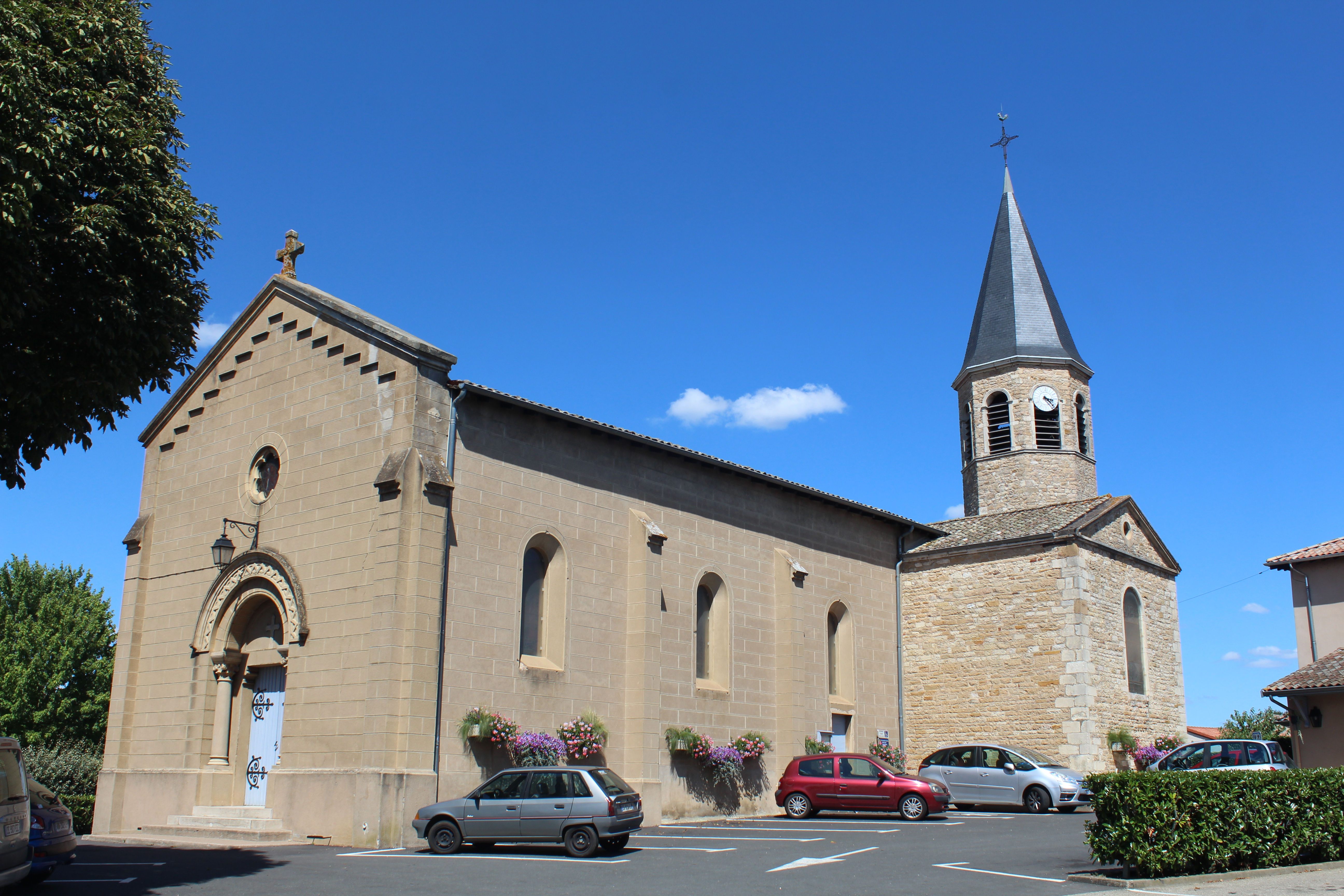 Église Saints-Philippe-et-Jacques de Montceaux.